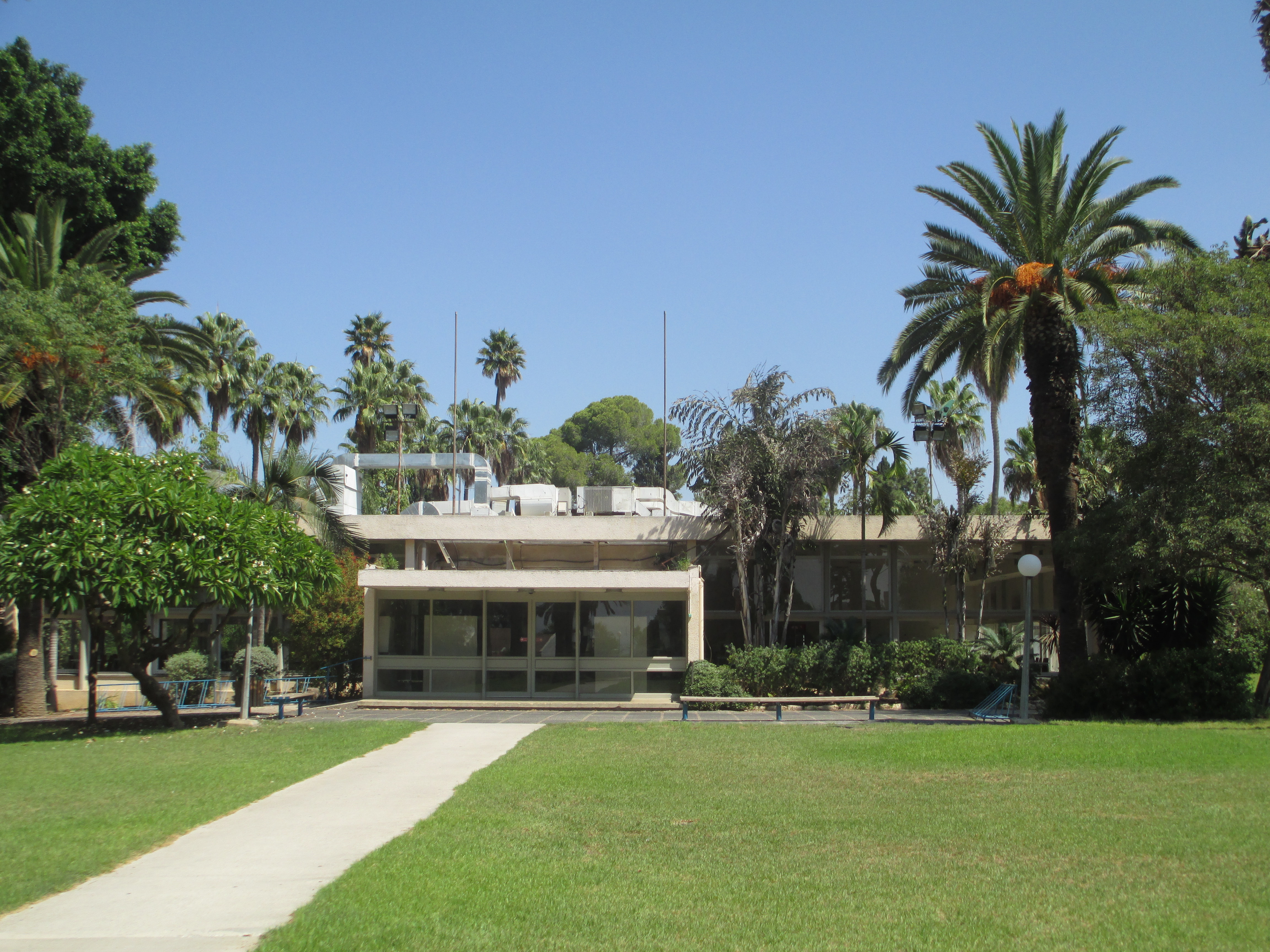 חדר האוכל בגבת